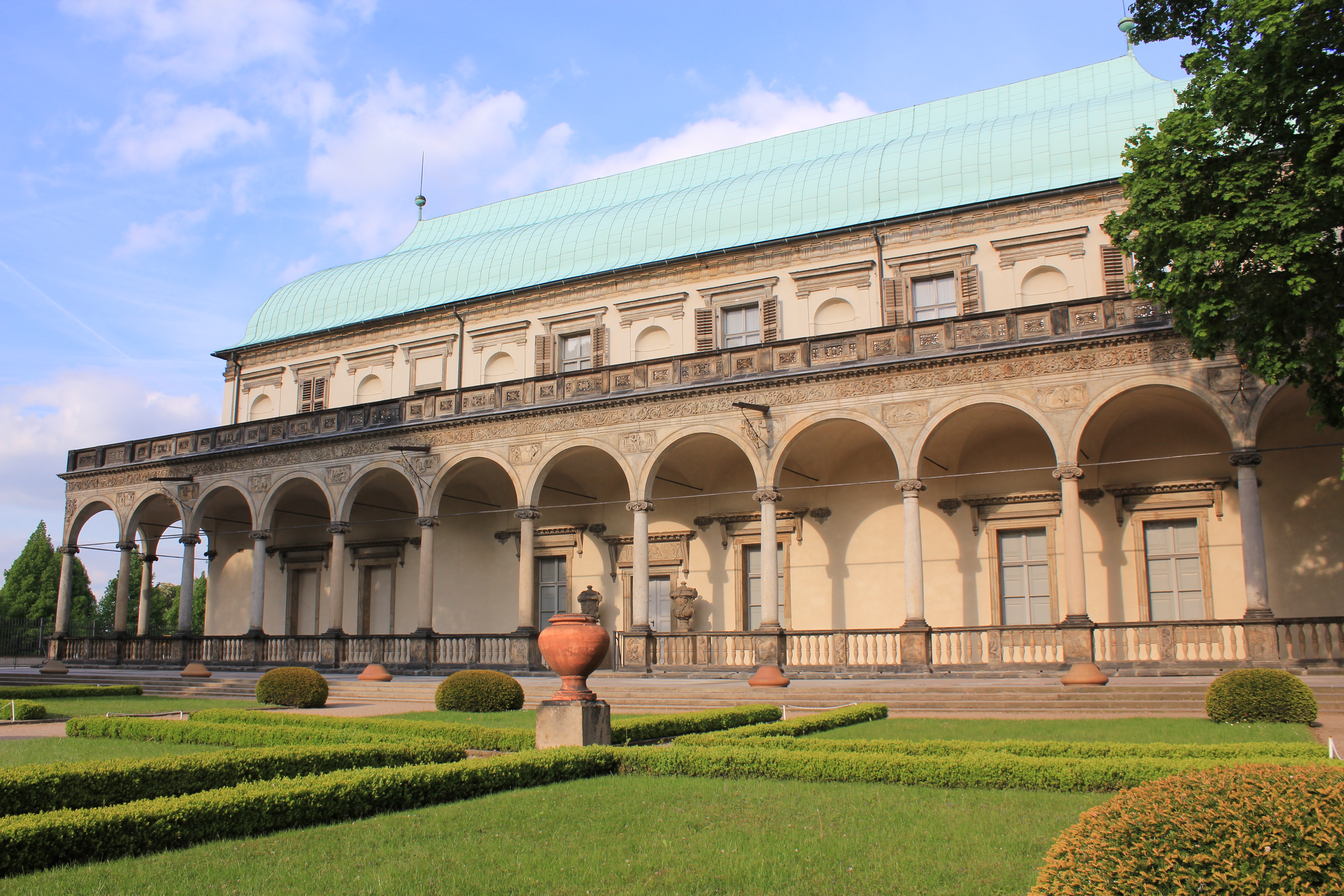 Belvedere